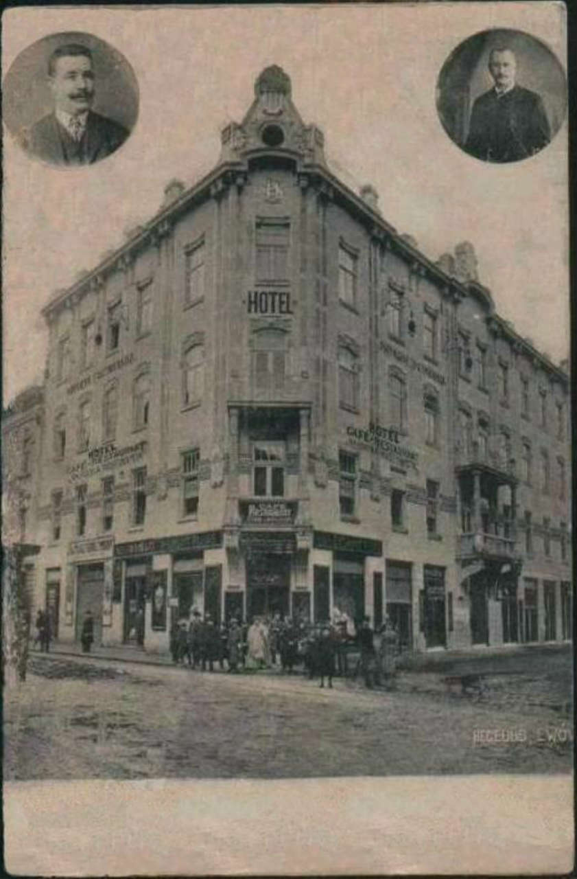 Готель